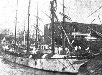 Goleta Austral zarpando del puerto de Buenos Aires